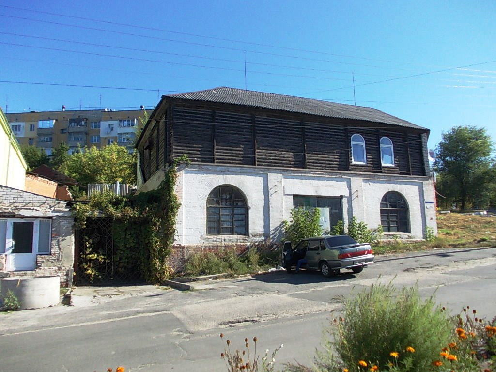 Дерев'яна церква (не використовується), Куп'янськ, вулиця Садова, 2